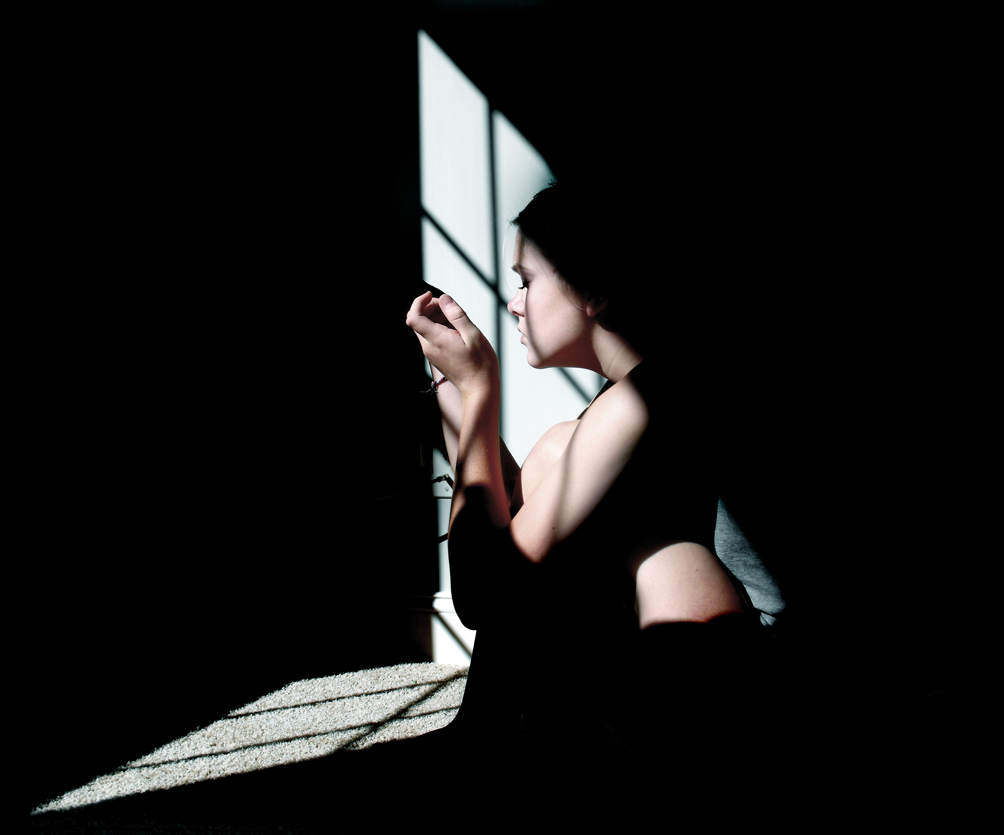 x